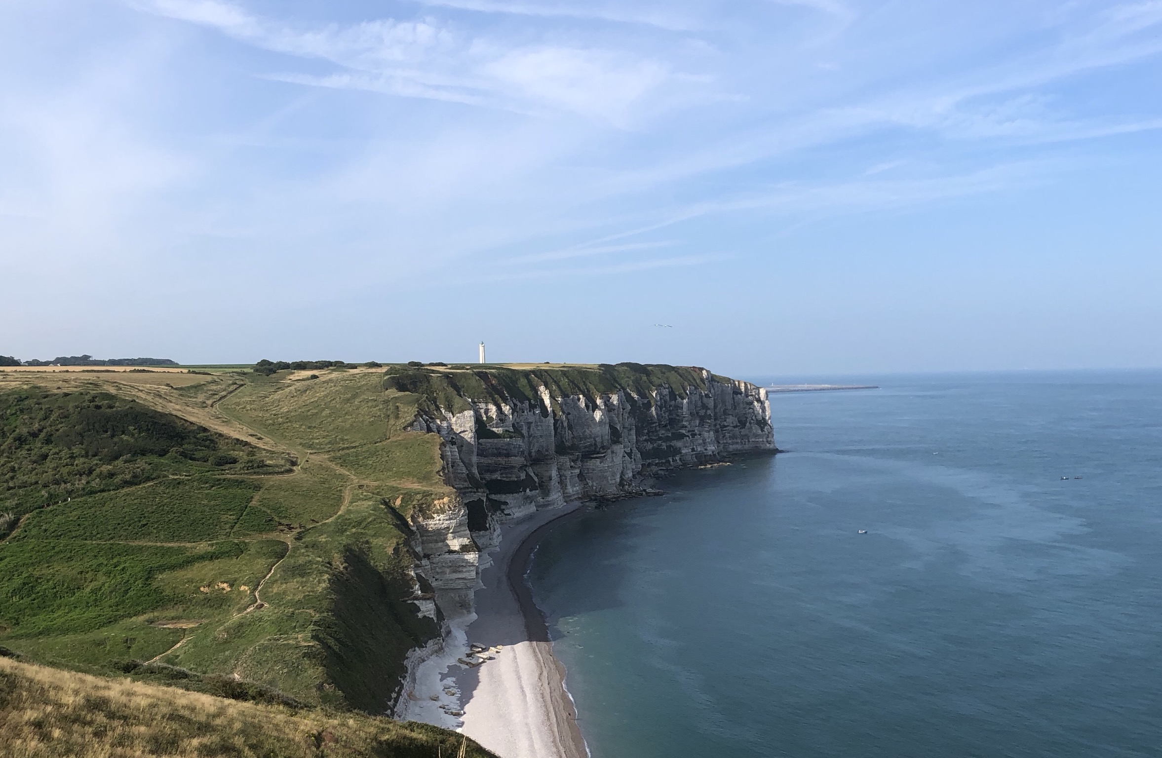 Point du Fourquet 2019